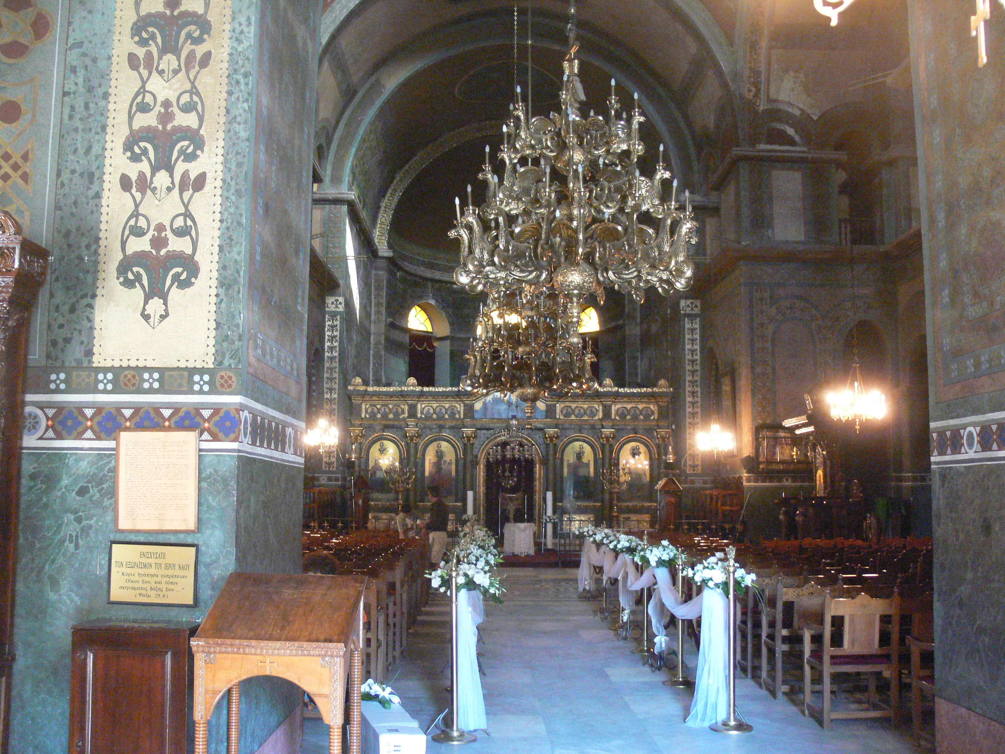 Tessaloniki. Agia Sophia.